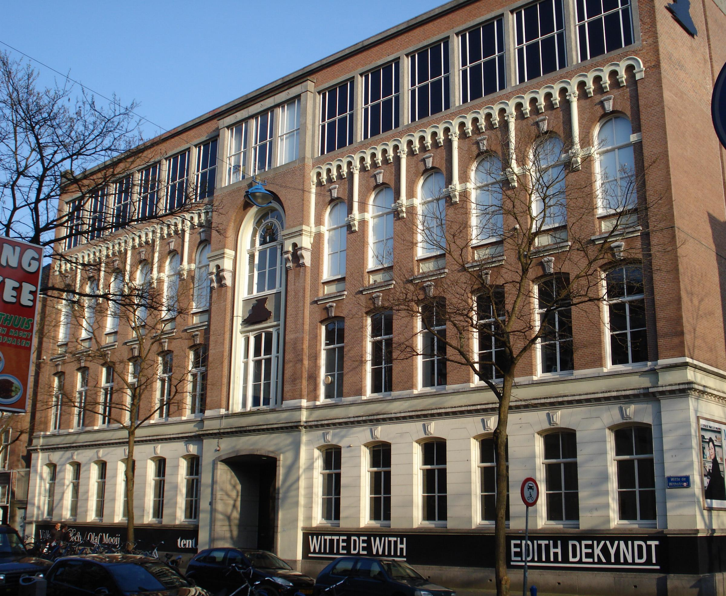 Rotterdam, Witte de Withstraat 50. Gemeentemonument.